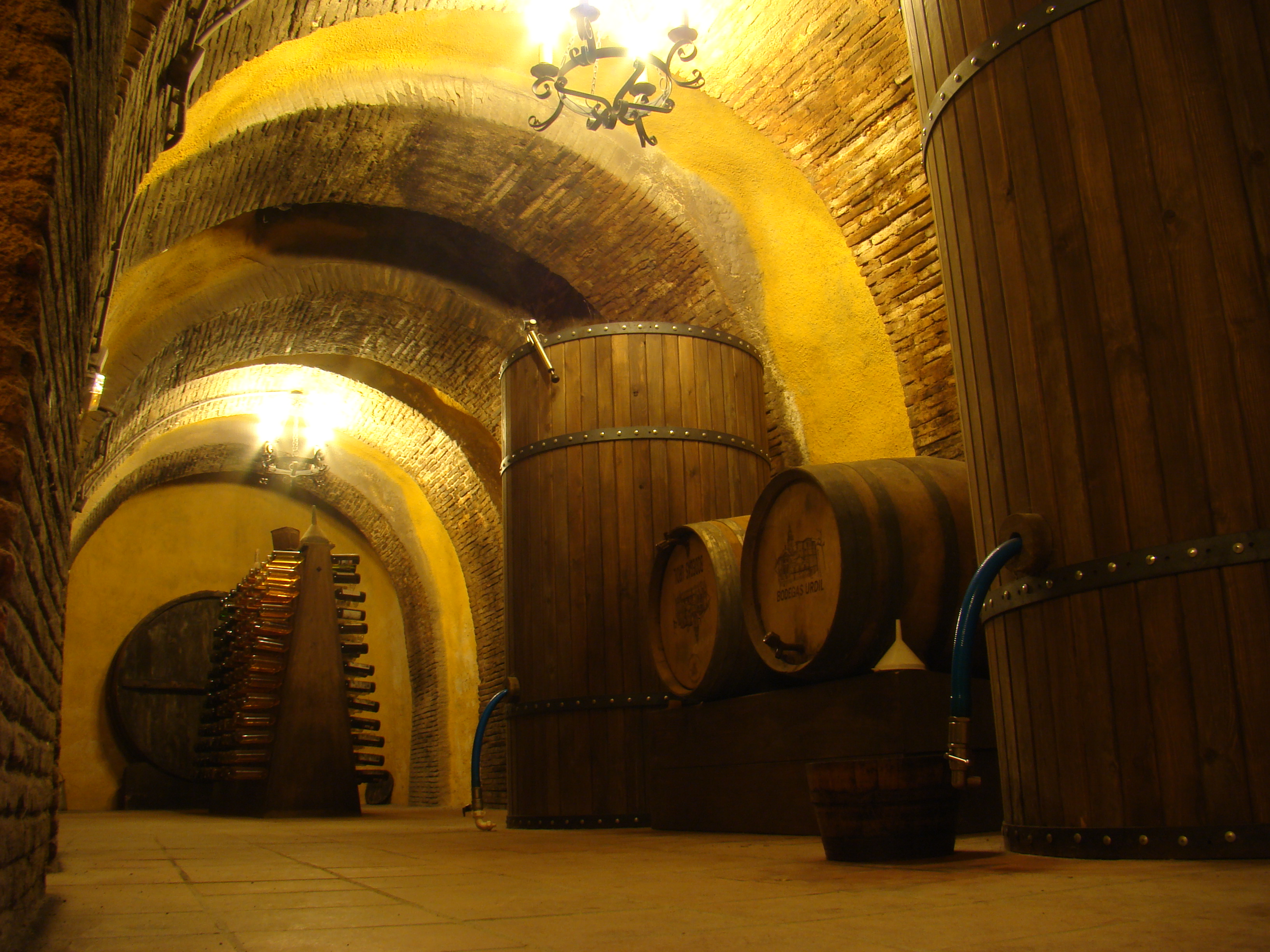 Nava del Rey, provincia de Valladolid, España. Esta localidad tiene el subsuelo horadado de bodegas, algunas de las cuales se pueden visitar.